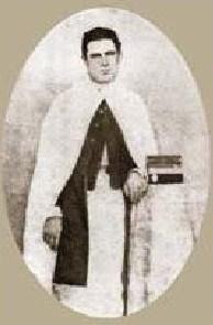 Sacerdote argentino nacido en 1839